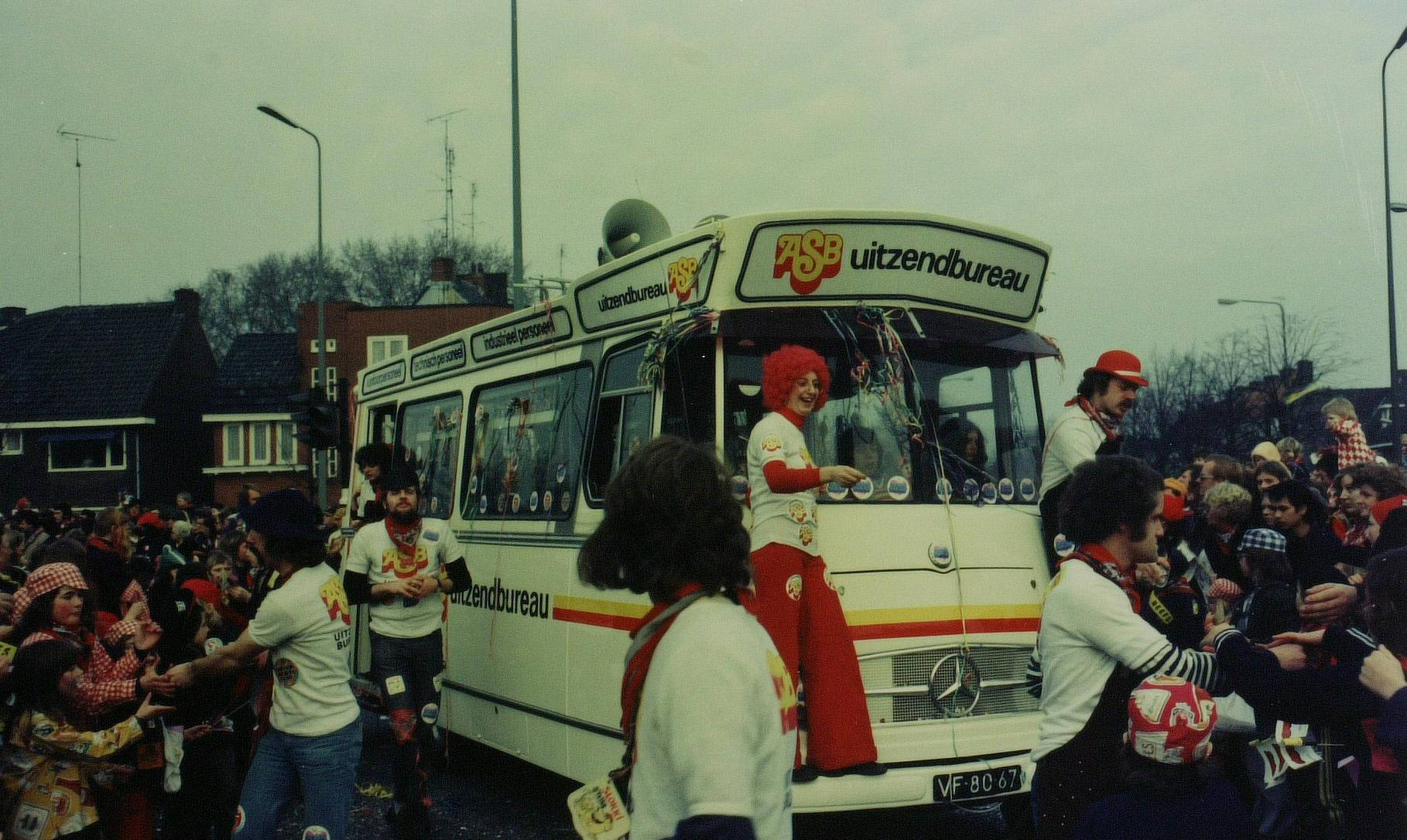 Flyeren met de ASB reclamewagen